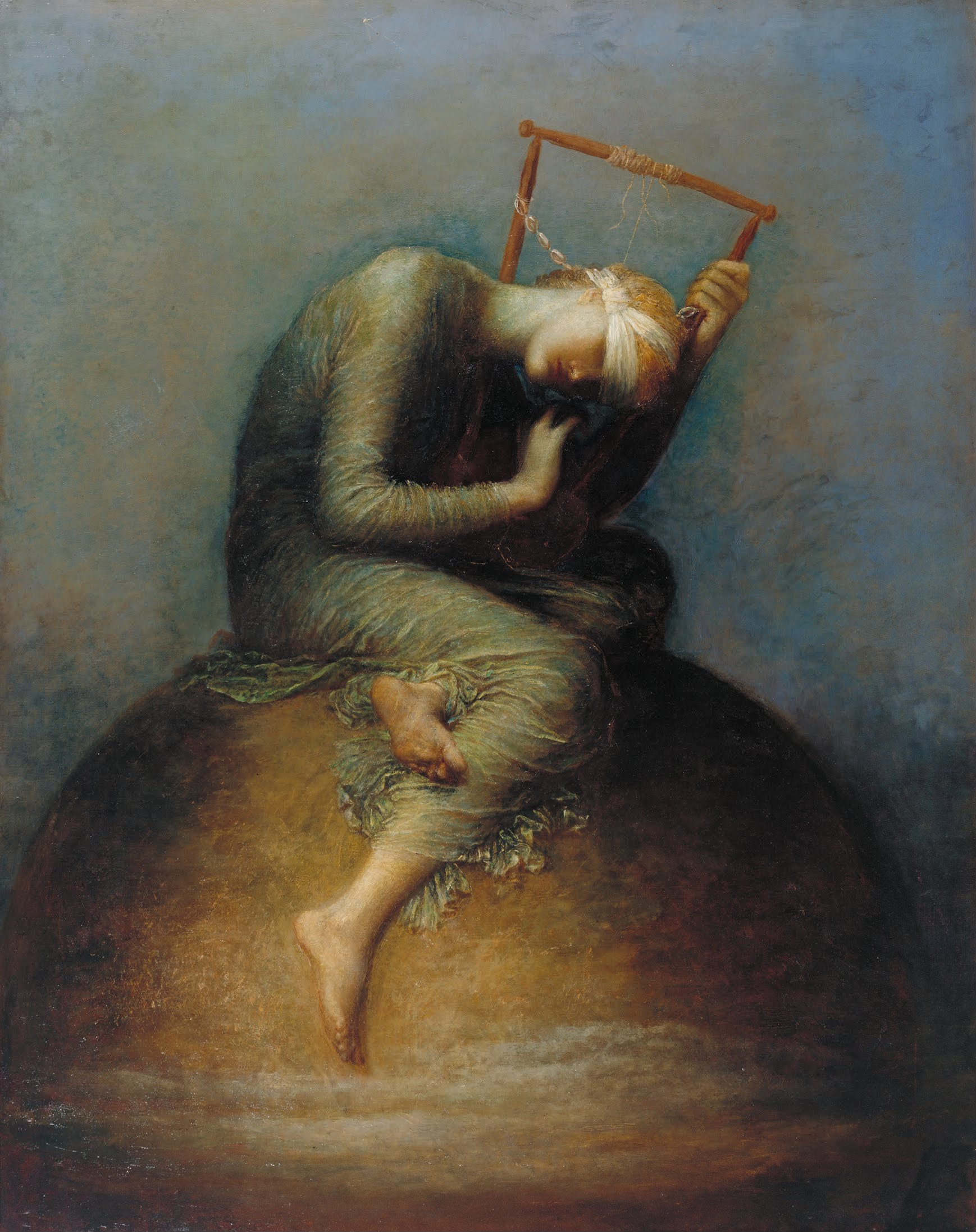 تابلوی امید اثر «جرج فردریک واتس» متعلق به ۱۸۸۶ است، در این تابلو امید در قالب زنی مجسم شده که چنگی با تنها یک رشتهٔ سالم در دست دارد. او سرش را نزدیک به آلت موسیقی گرفته است، تا بتواند نوای ضعیف موسیقی برخاسته از تک‌تار سالم را بشنود.